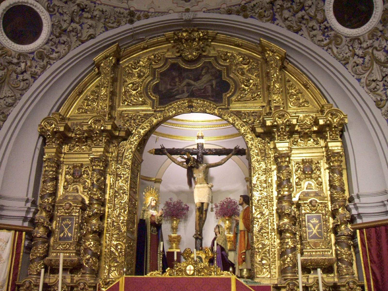 Iglesia de Nuestra Señora de Gracia (Trinitarios), en Córdoba, España